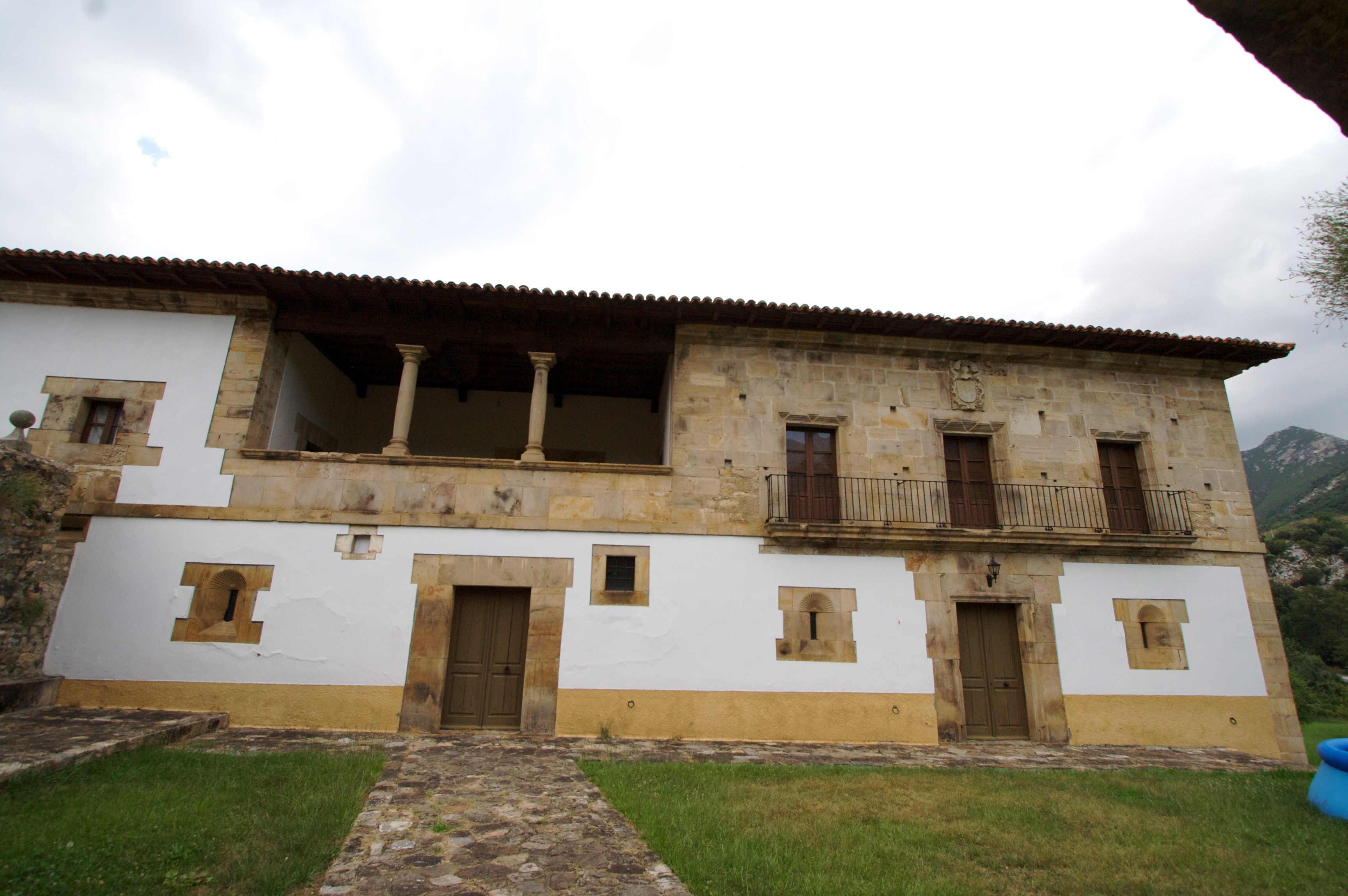 Frontal de la Casa de Cernuda, Poo de Cabrales, concejo de Cabrales, Asturias.